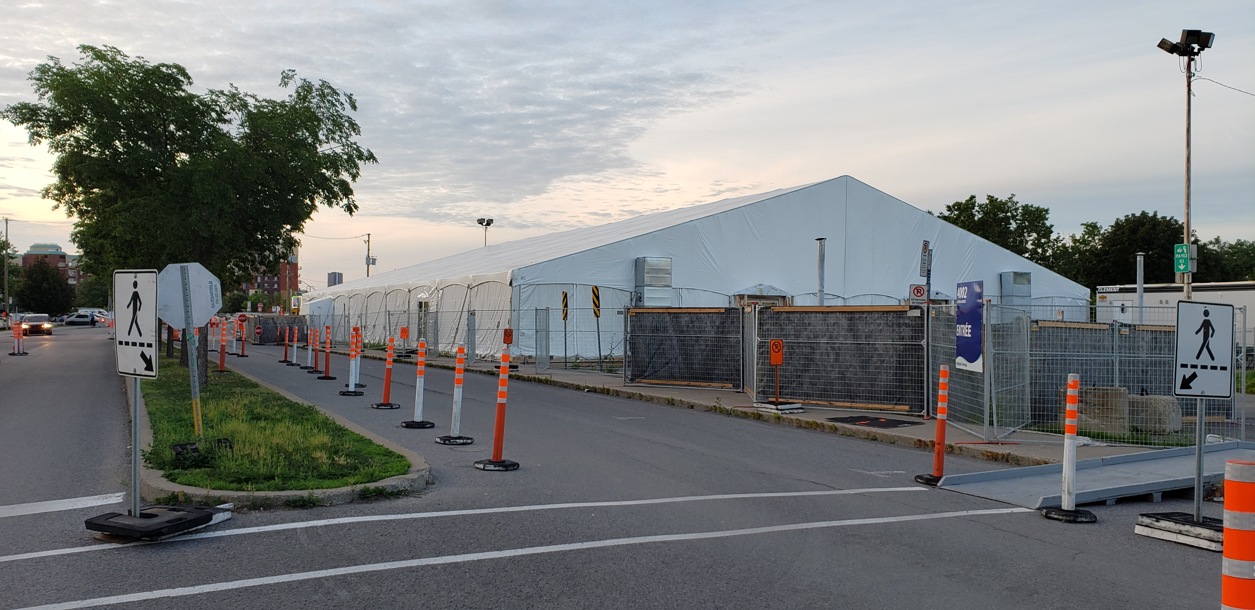 Érigée en 11 jours dans le stationnement dudit centre hospitalier, l'annexe de l’hôpital de Verdun est un immense chapiteau blanc installé dans le cadre de la Pandémie de Covid-19 au Québec.